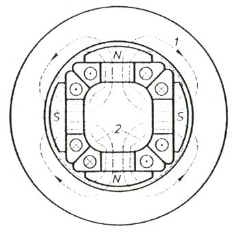 Figura 10.Makina katerpolare me pole të theksuara në rotor